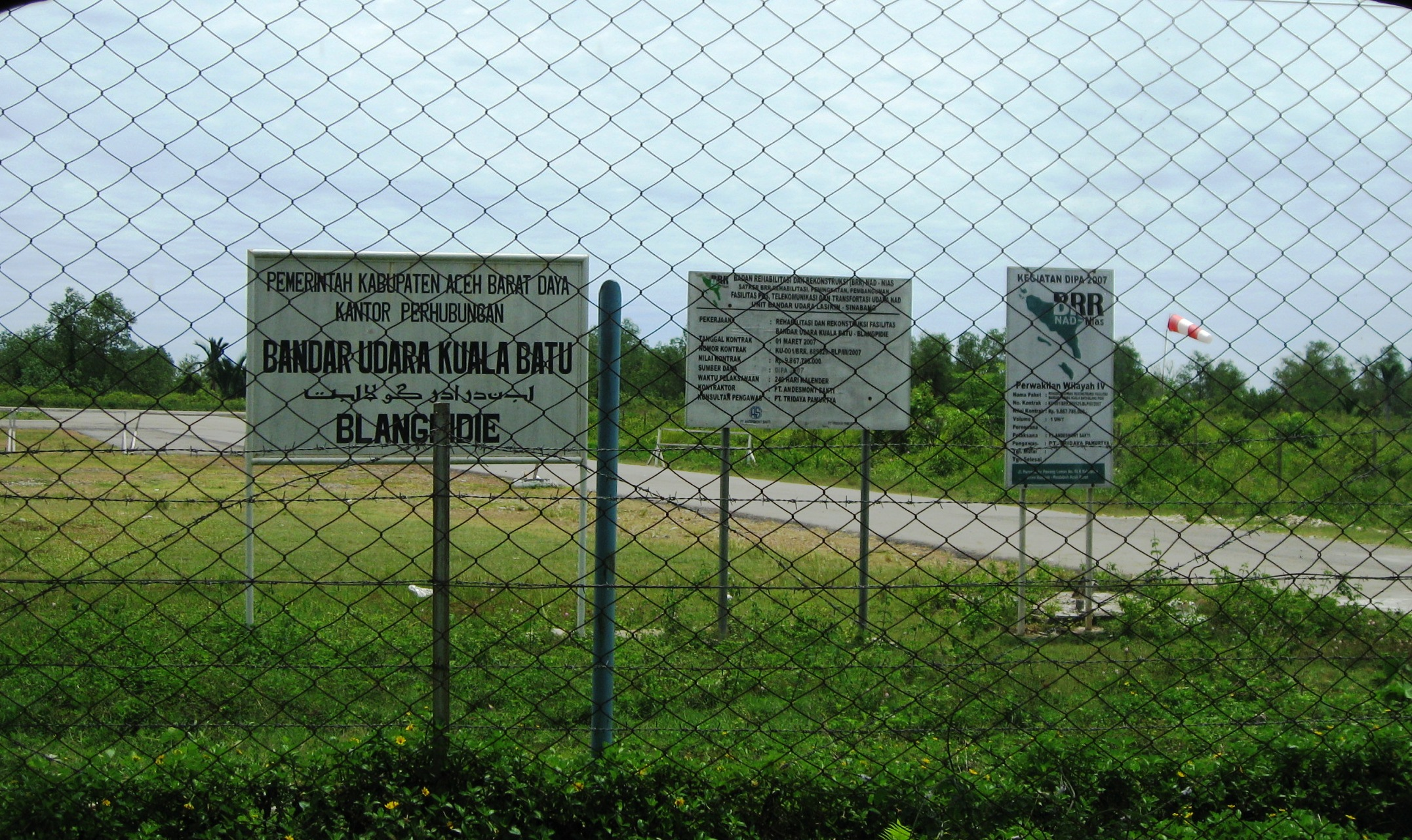 Bandara Kuala Batu, Blang Pidie